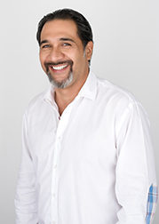 Jorge Mauricio Escobar Sarria ( Santiago de Cali - Valle del Cauca, marzo 7 de 1974) Investigador de las ciencias de la comunicación colombiano con domicilio en la ciudad de Santiago de Cali. Profesor titular de la Universidad Autónoma de Occidente y Profesor asesor de trabajos de grado en la Maestría en Comunicación Digital de la Universidad Pontificia Bolivariana - Medellín.